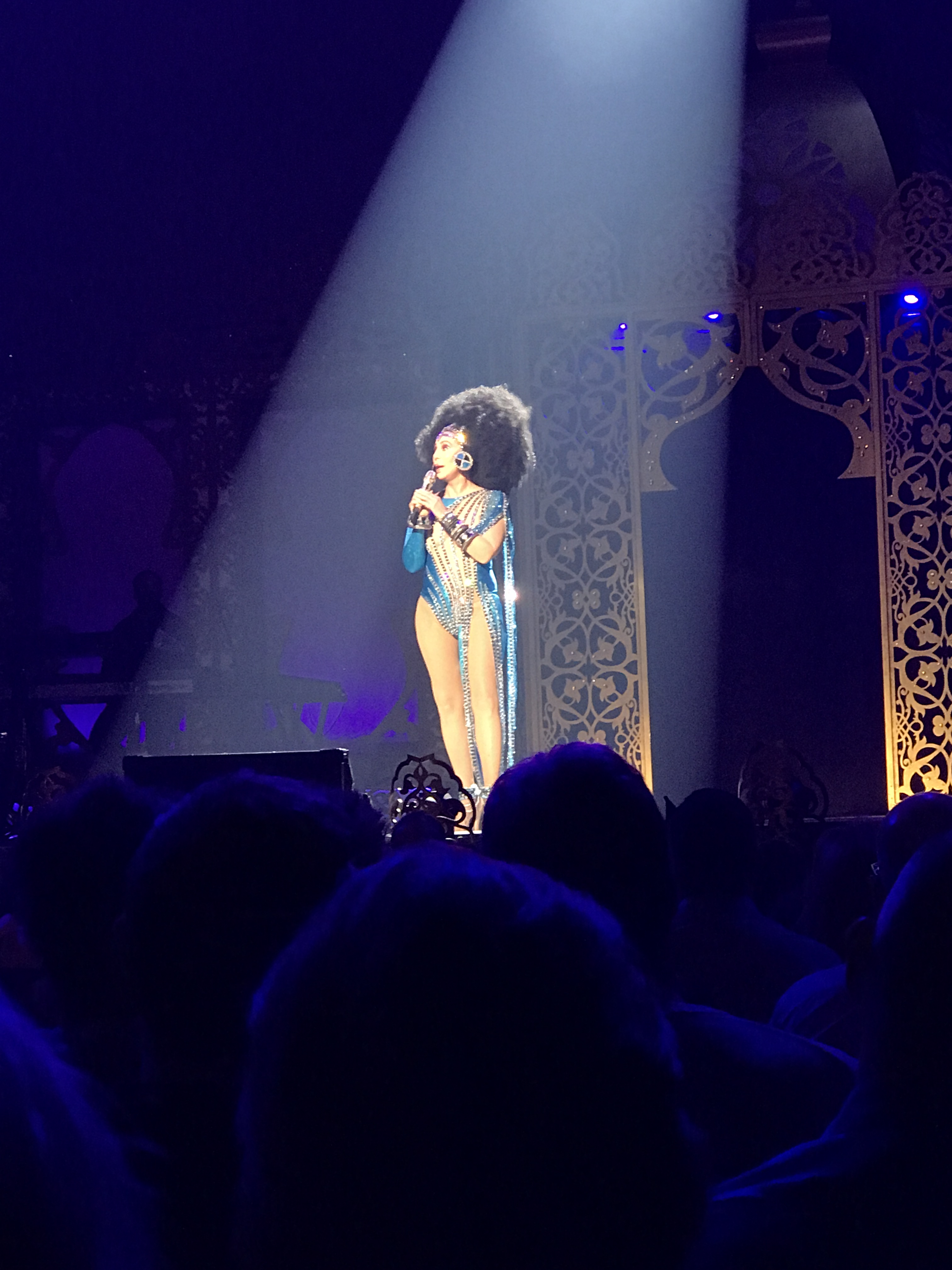 Cher cantando en el show Classic Cher.